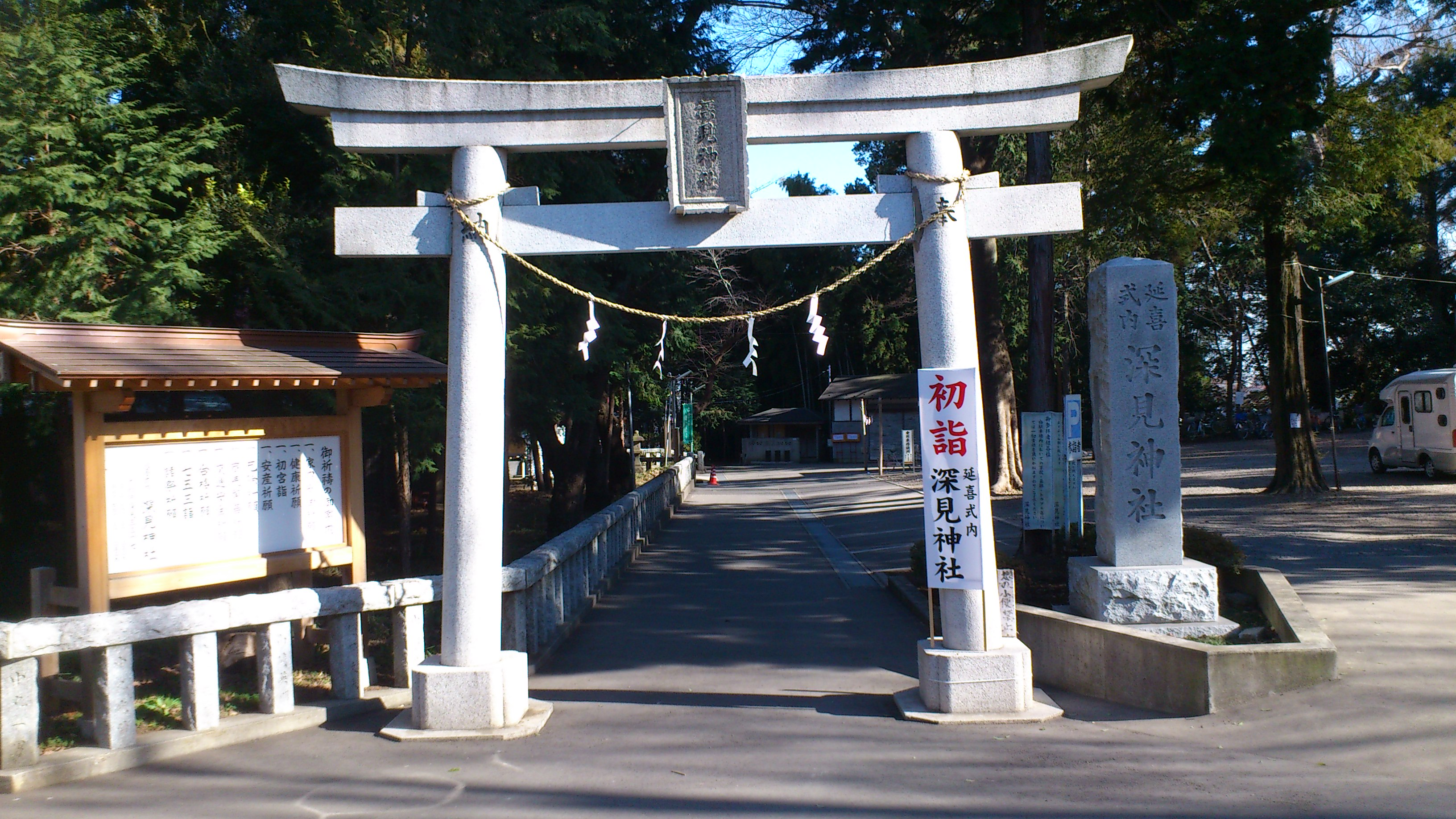 神奈川県大和市の深見神社西側の鳥居。2013年1月撮影。